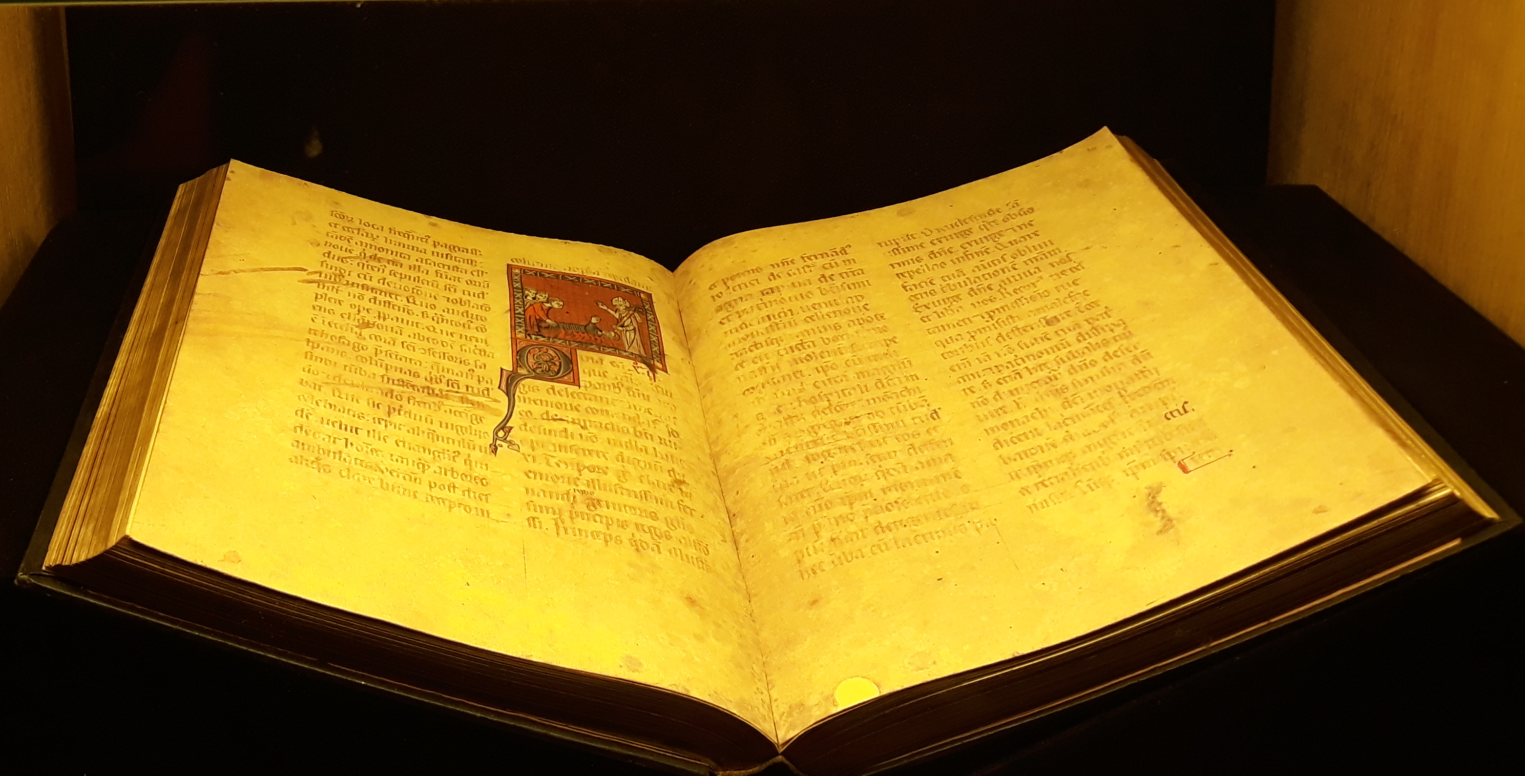 Biografía de San Rosendo escrita polo monxe Ordoño de Celanova arredor do 1172, inspirada en textos anteriores, e con engadidos do século XIII sobre os seus milagres. Fotografía do facsimile conservado no museo parroquial de San Martiño de Mondoñedo. Orixinal na Biblioteca Nacional de Portugal.